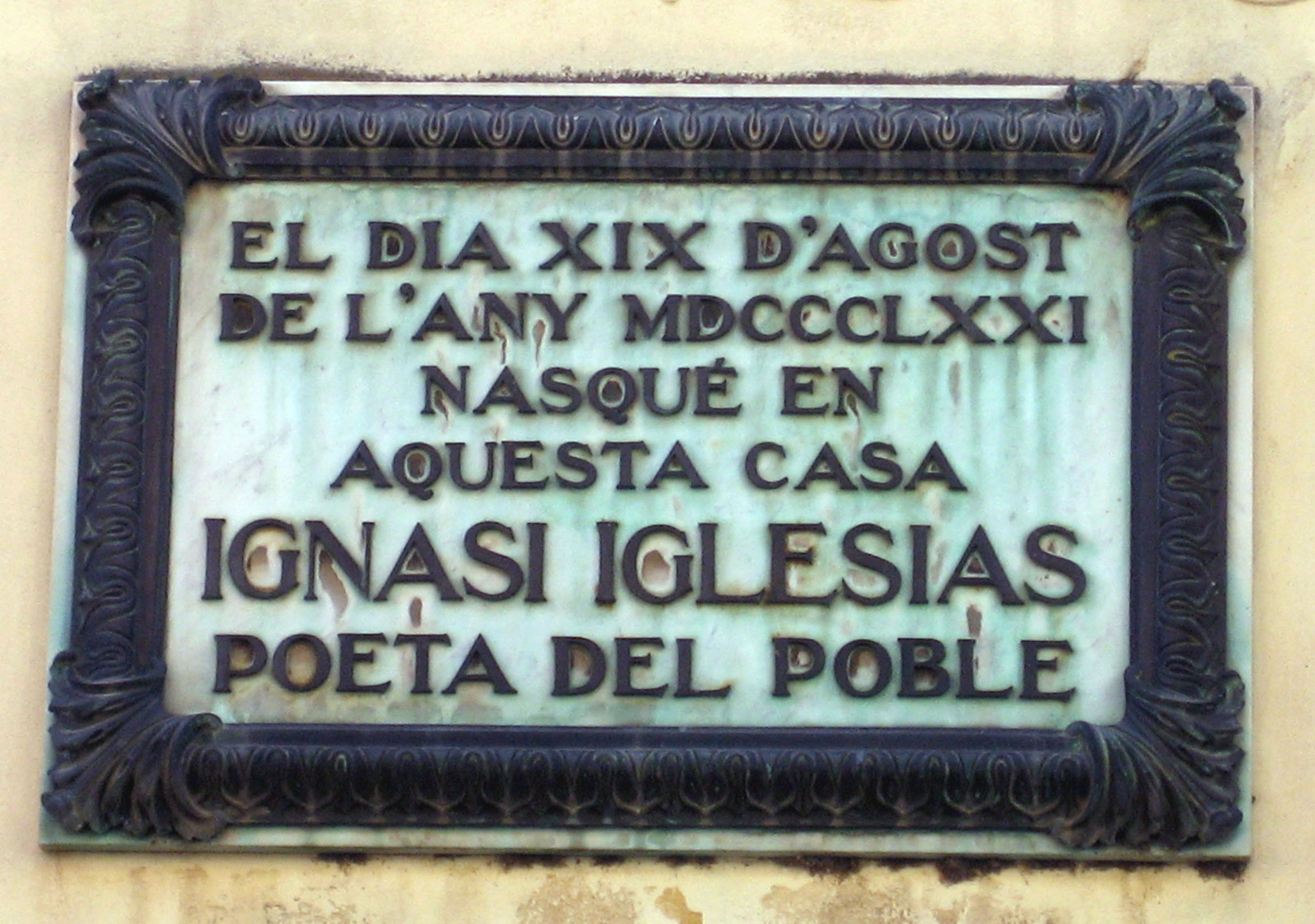 Placa a la casa on nesqué Ignasi Iglésias al barri de Sant Andreu de Palomar (Barcelona) Catalunya